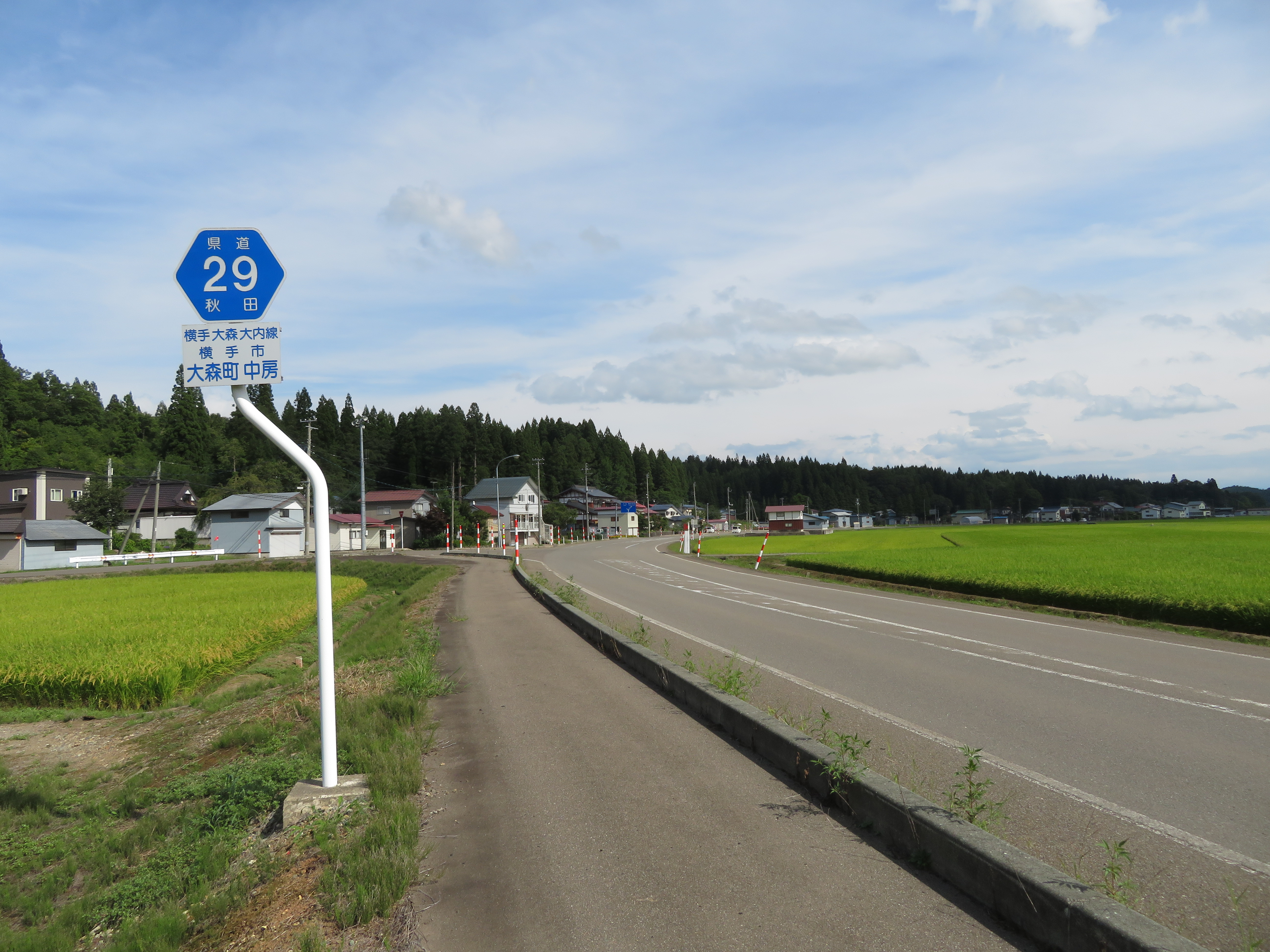 秋田県道29号線横手市大森町中房付近（横手市街方面を撮影） Canon PowerShot SX720 HS